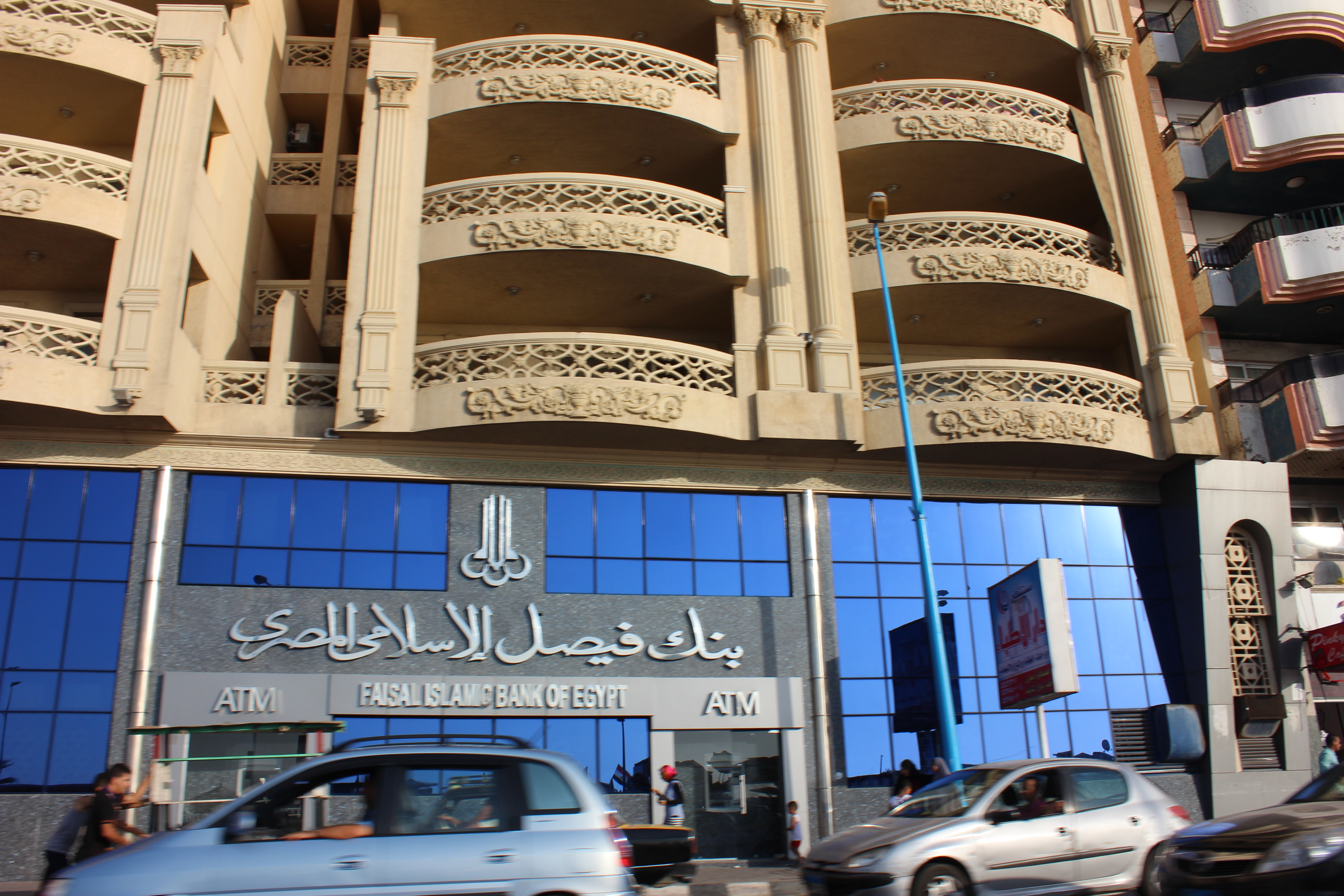 مباني الإسكندرية وبعض العلامات المميزة.